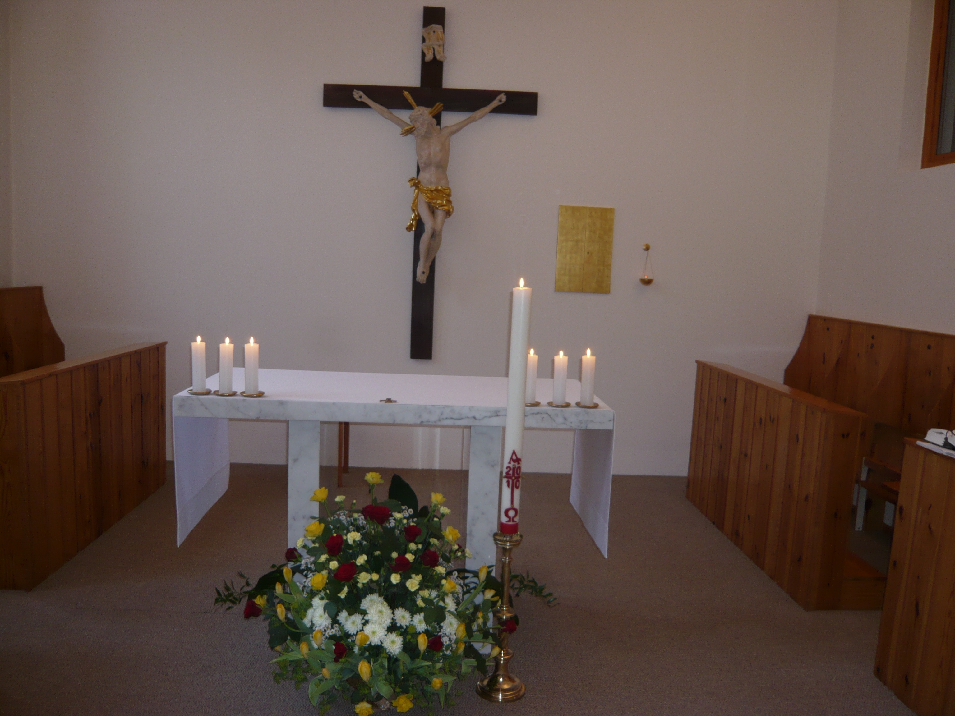 Pohled do presbyteria kaple